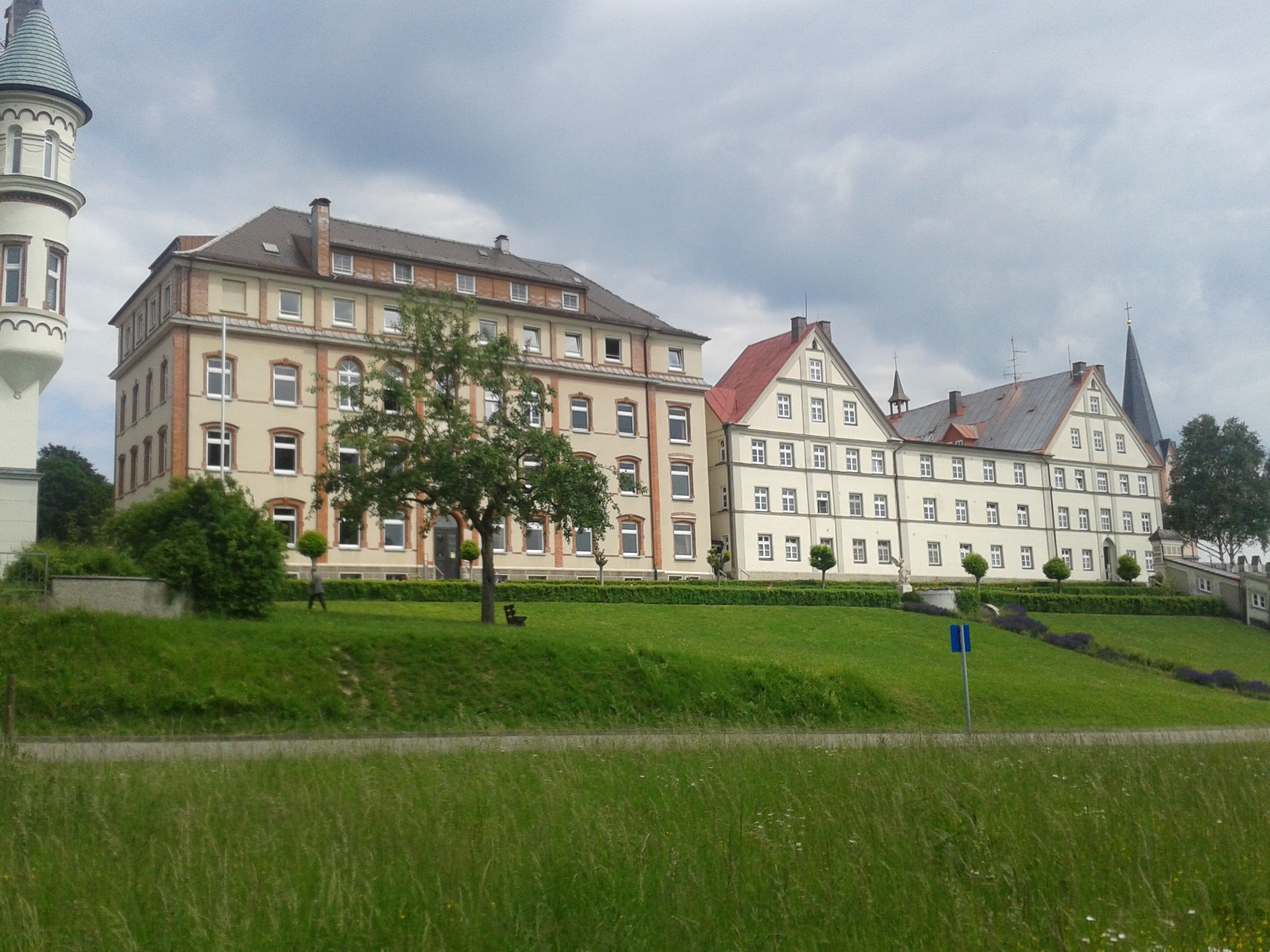 Kloster Bonlanden